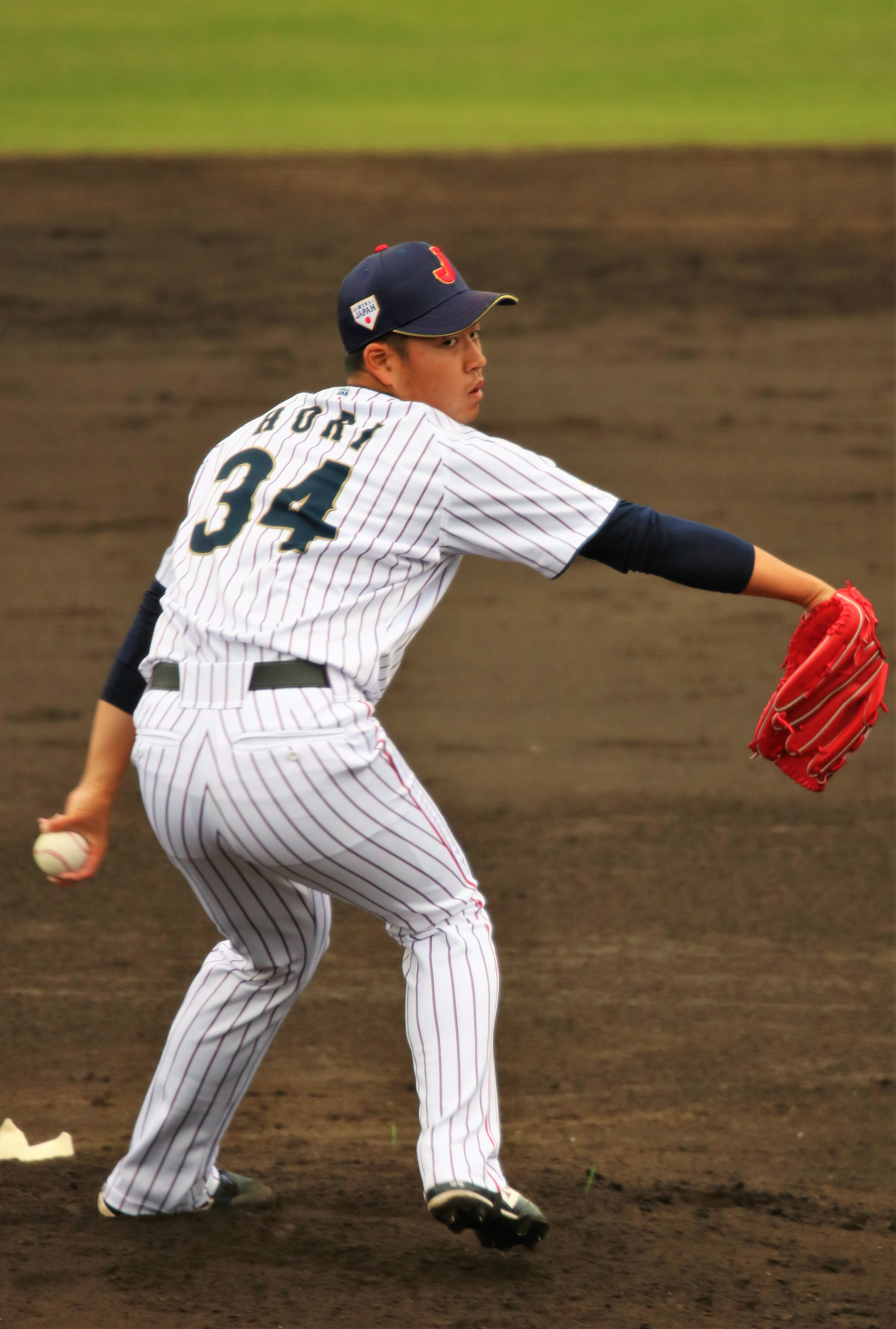 2017/11/13 侍ジャパン壮行試合( SOKKENスタジアム |宮崎市清武総合運動公園 )